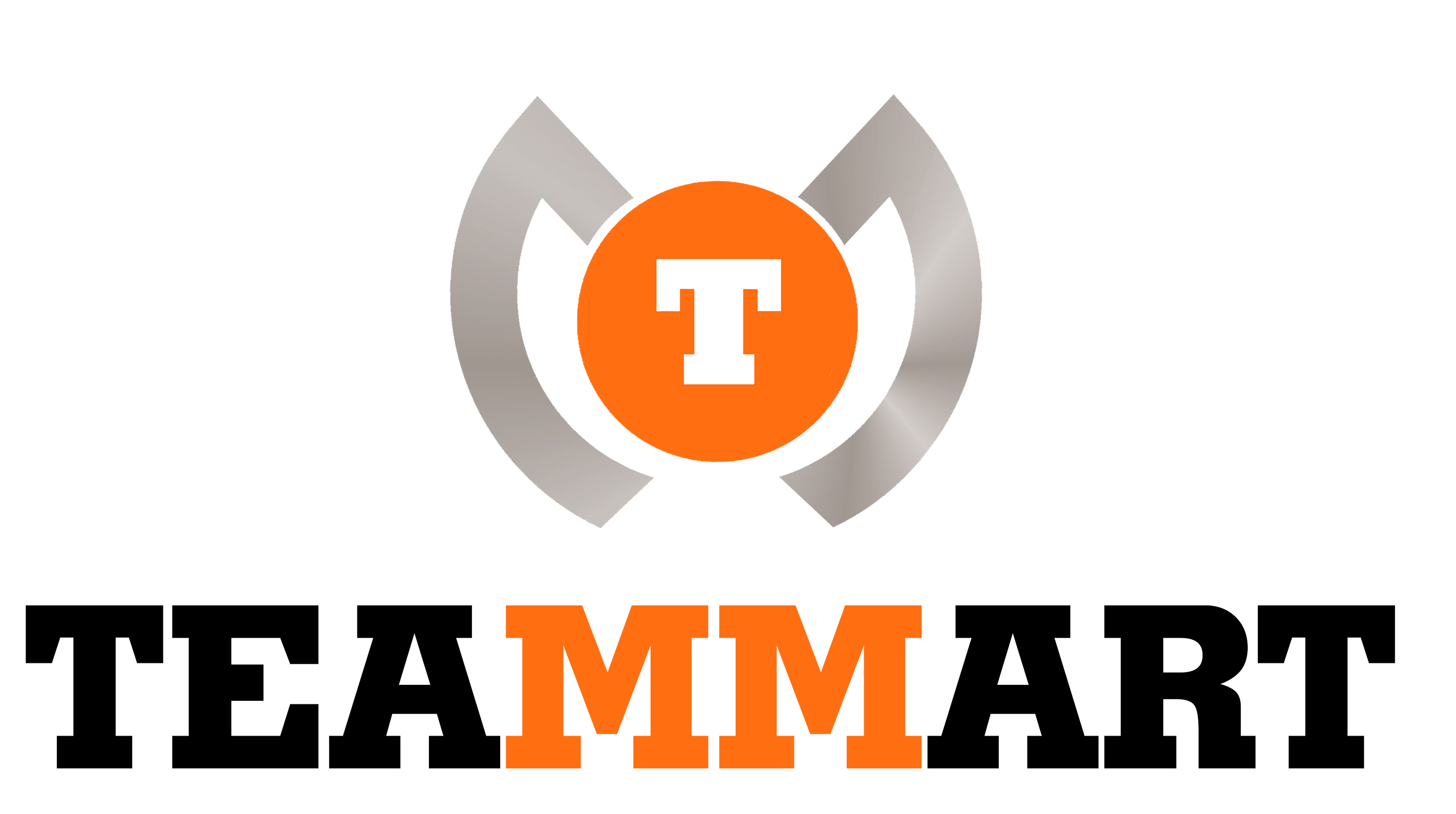 کوردی: زنجیره‌ ماركێته‌كانی تیم مارت